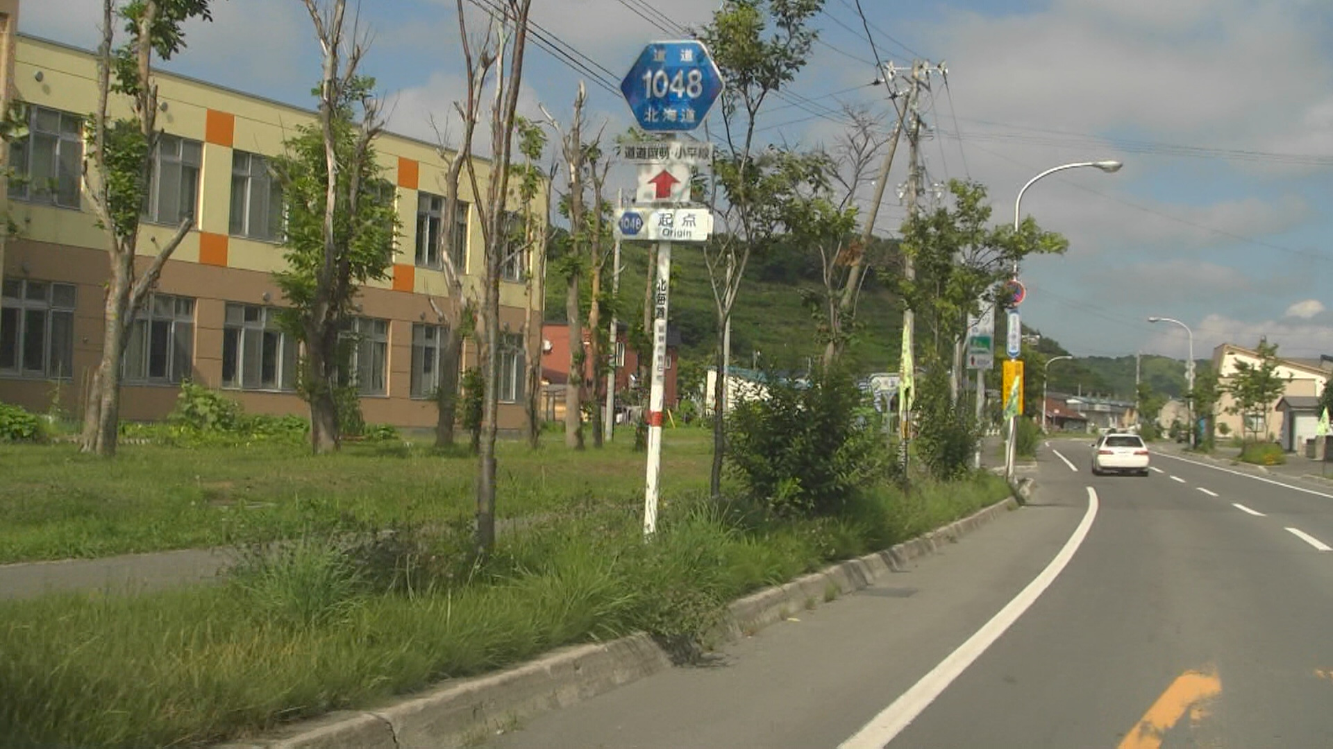 北海道道1048号留萌小平線